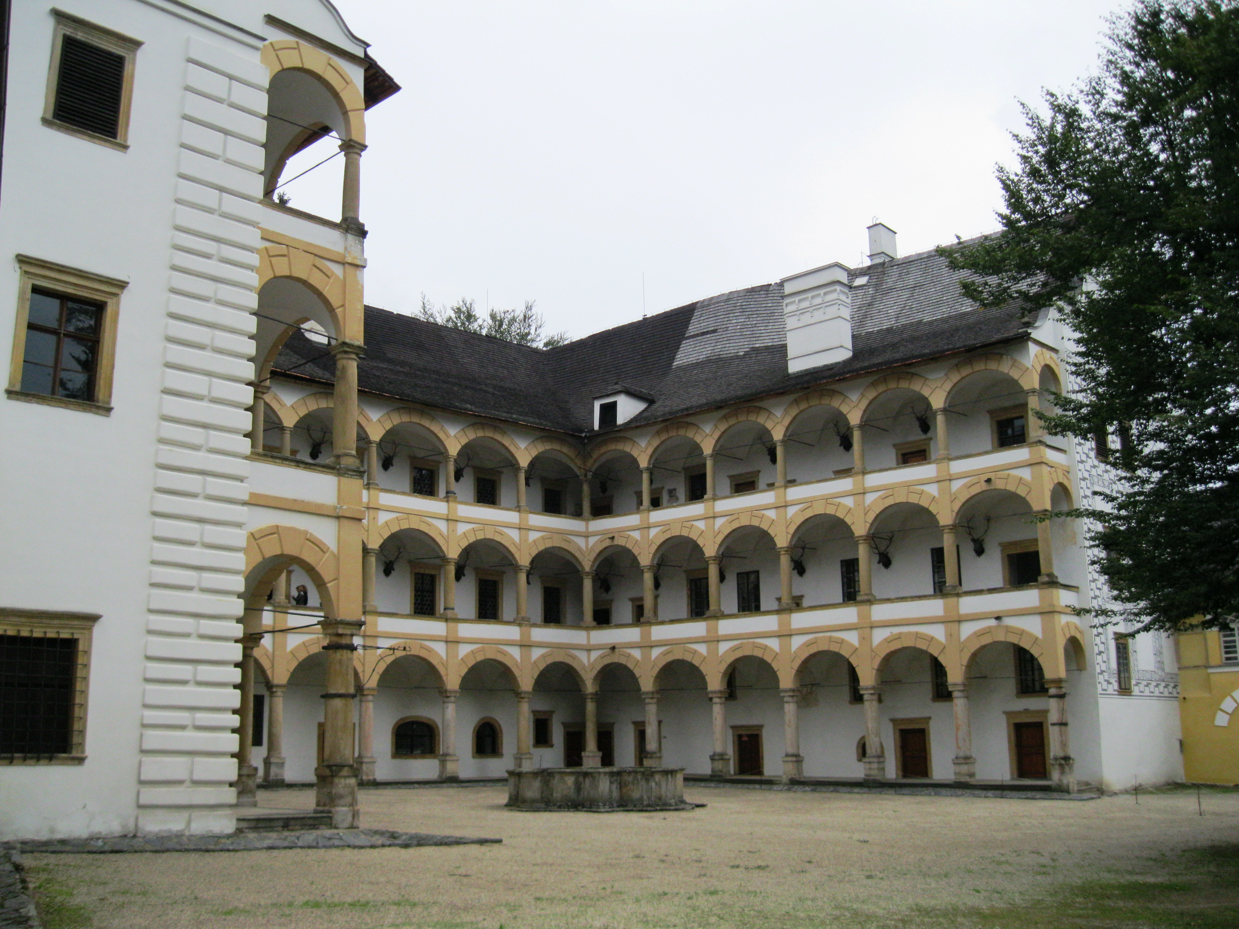 Zámek Velké Losiny, Velké Losiny 268